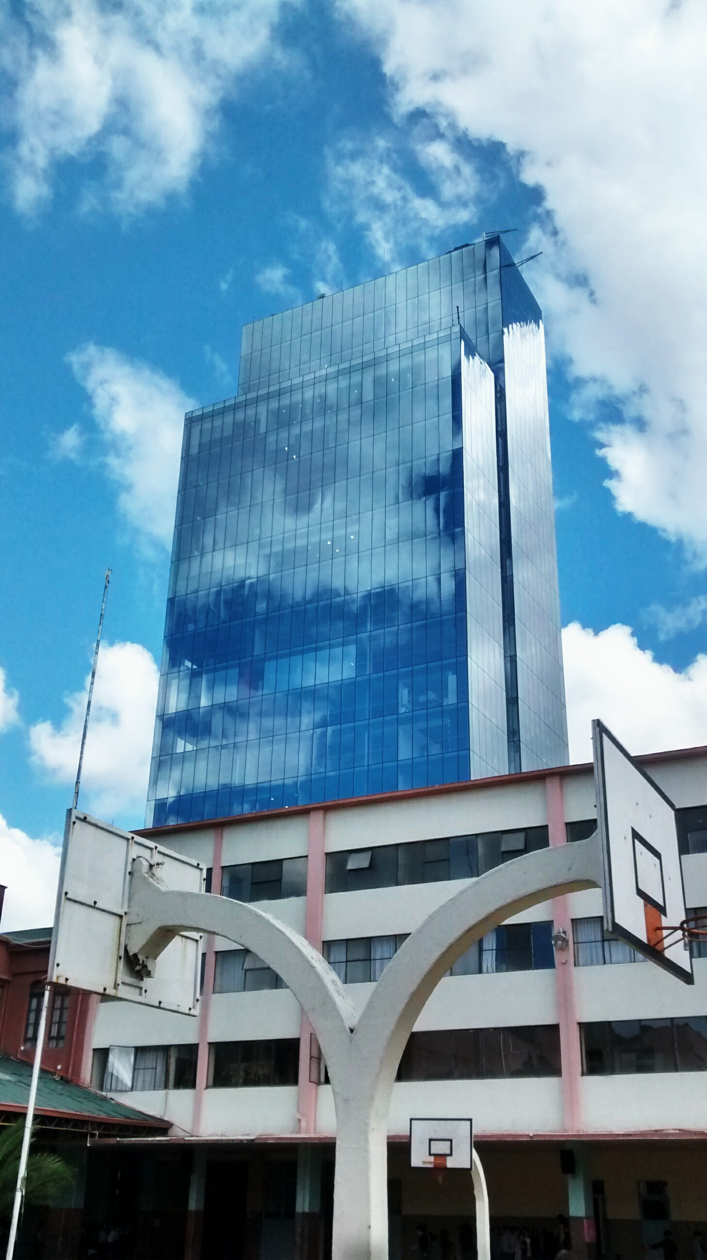 Edificio Capital de la ciudad de Temuco, Chile, visto desde el Colegio de La Salle.